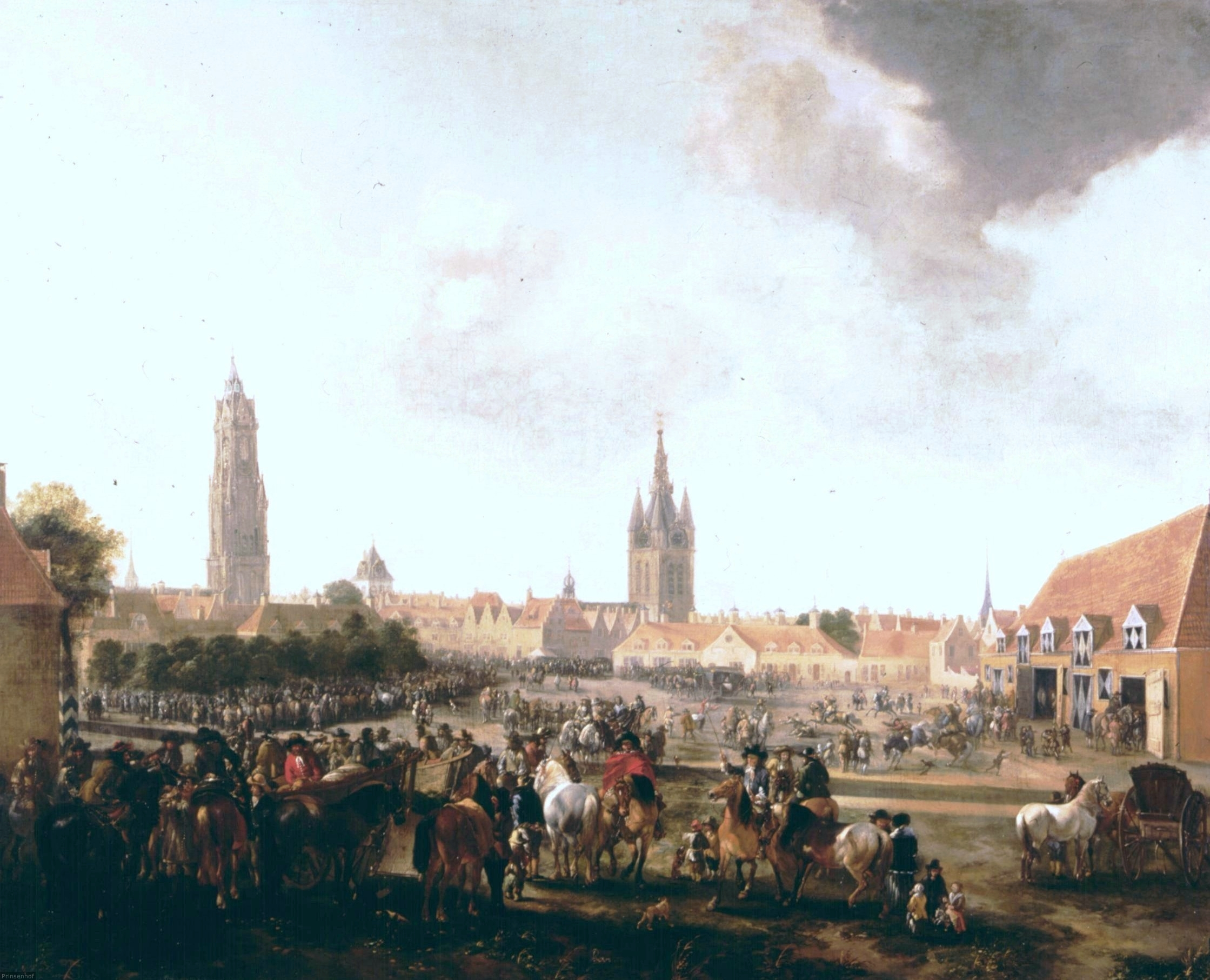 View on the horse market in Delftlabel QS:Len,"View on the horse market in Delft" label QS:Lnl,"Gezicht op de Paardenmarkt te Delft"